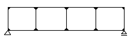 Vierendeeltraeger